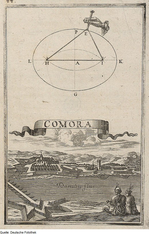 Original image description from the Deutsche FotothekGeometrie & Architektur & Festungsbau & Vermessung